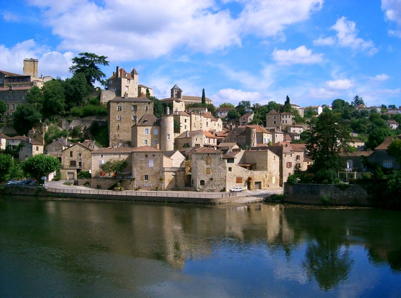 Puy-l'Evêque